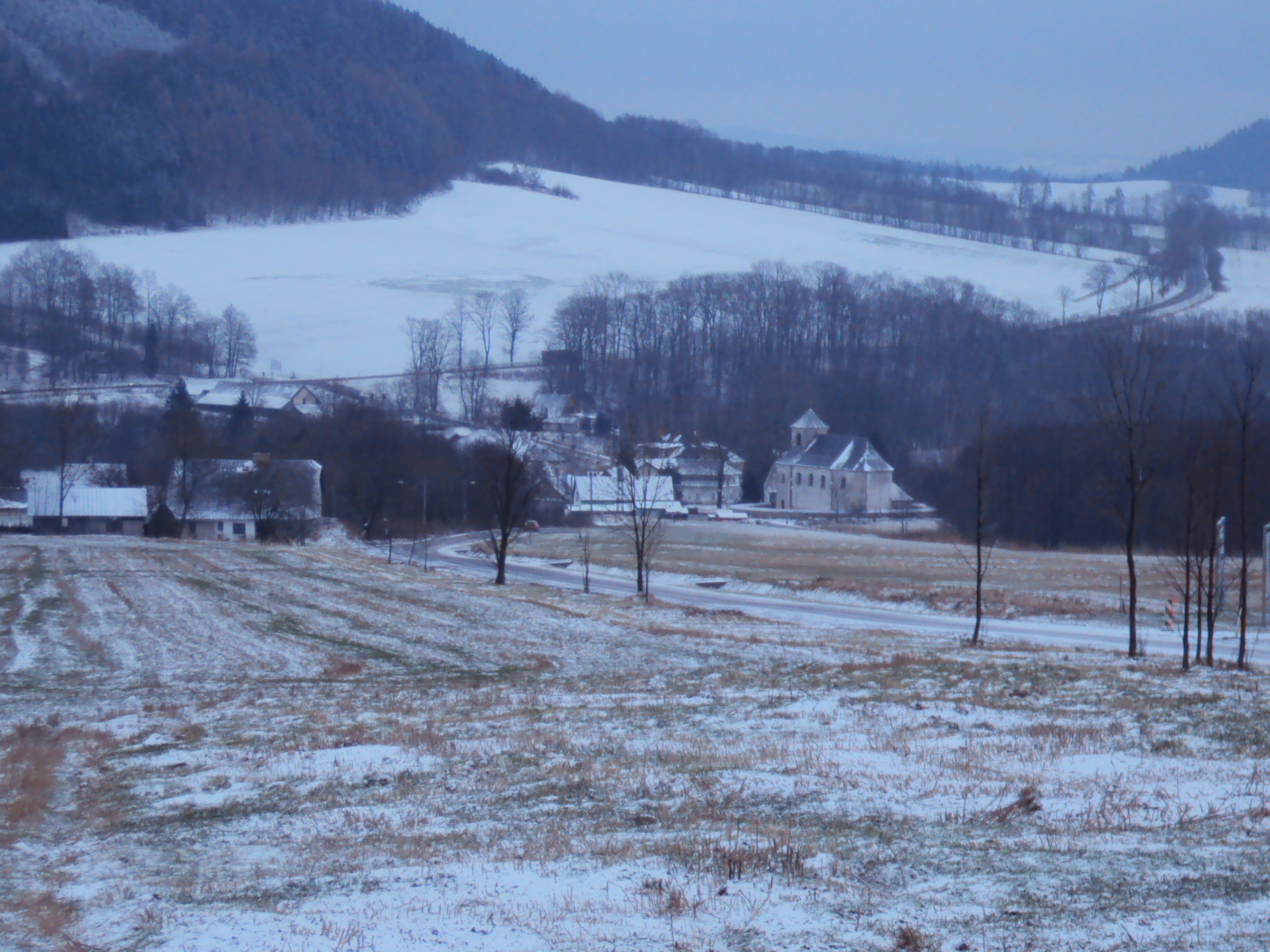 Vesnice Mlýnický Dvůr